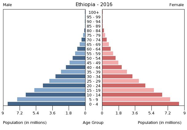 Demografie Äthiopiens